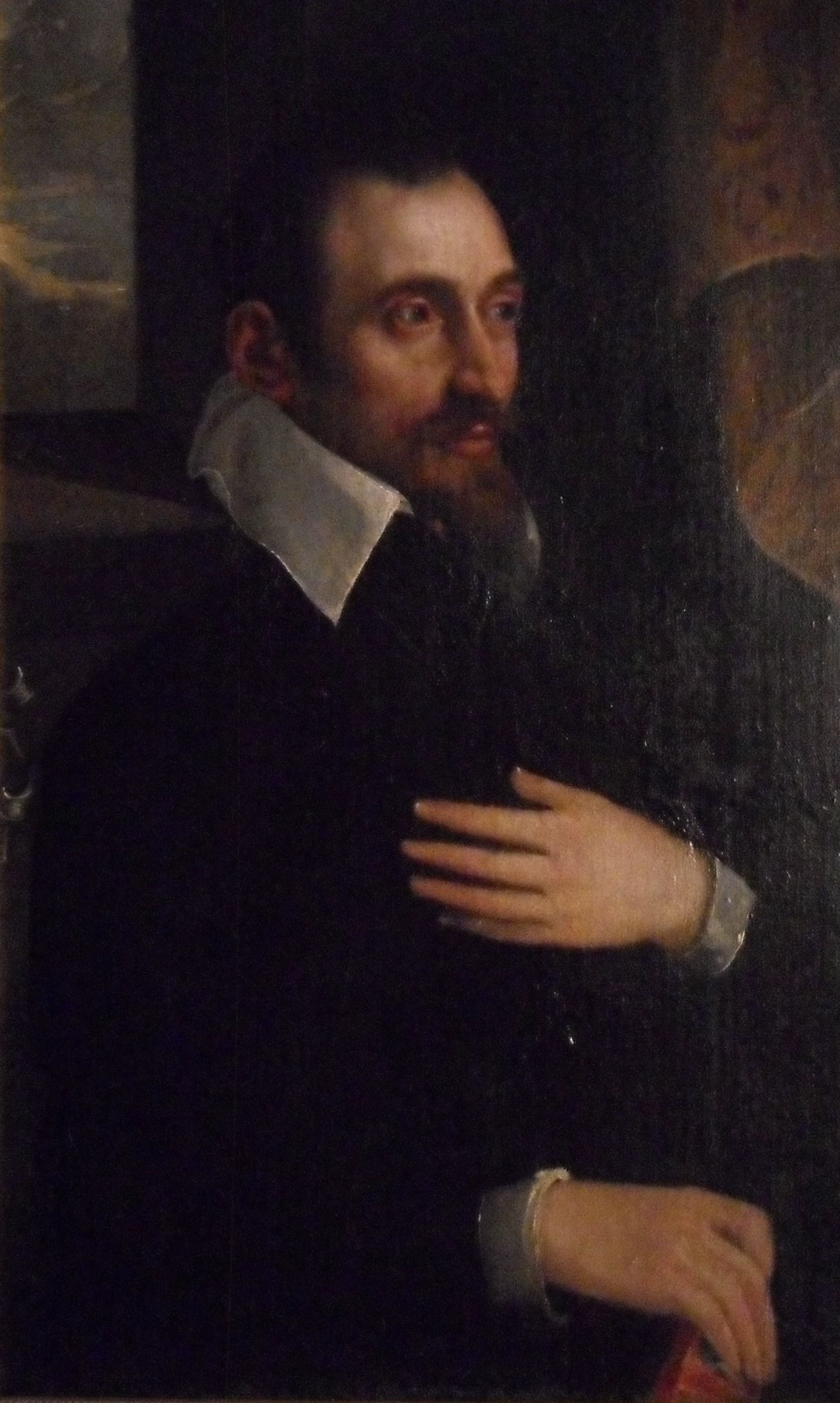 Údajný portrét Jiřího Mehla, výřez z votivního obrazu, sbírky státního hradu Grabštejn